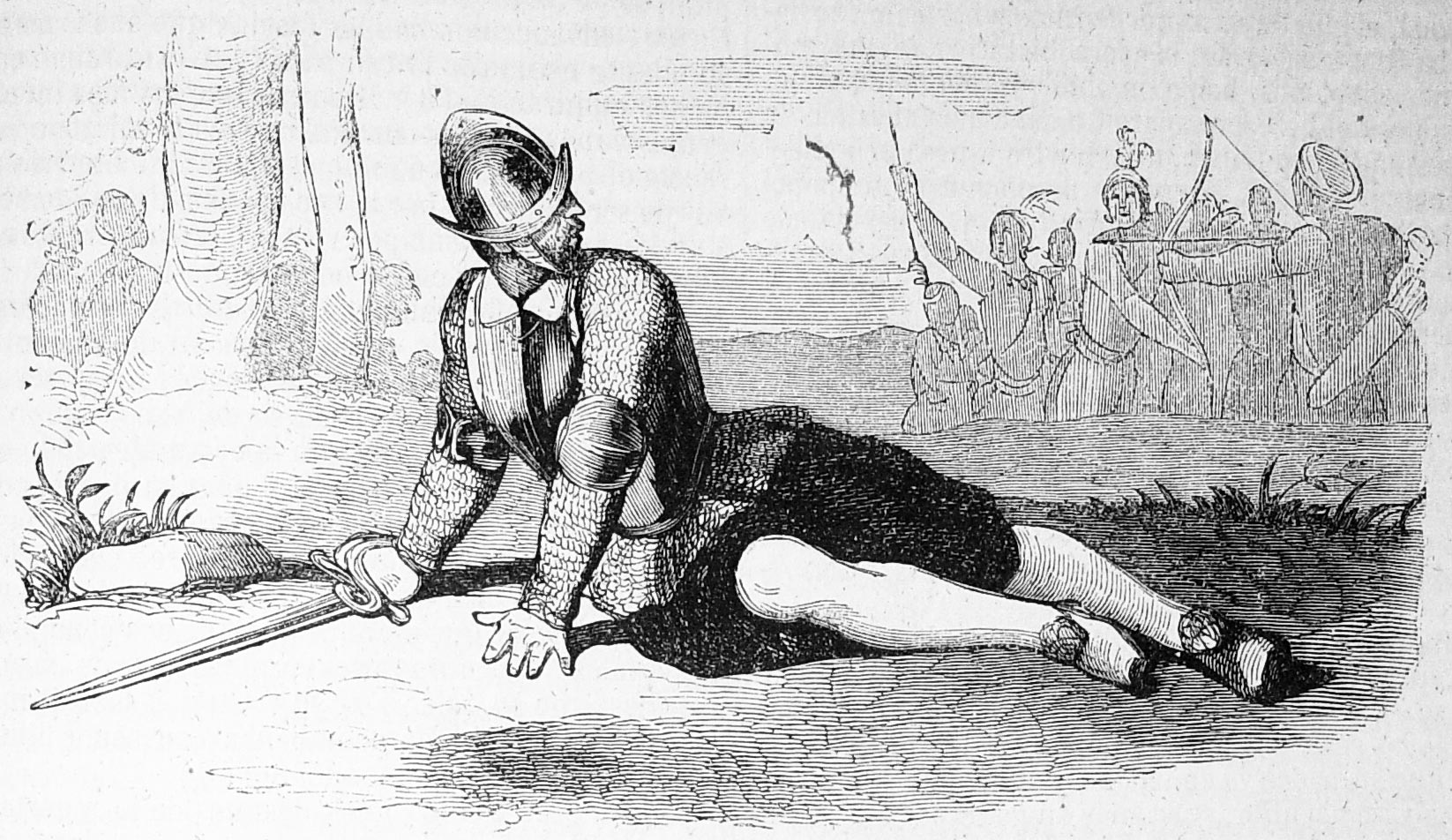 Puede acceder al libro completo en el siguiente enlace : Historia de la conquista del Perú : con observaciones preliminares sobre la civilización de los incas / por Guillermo H. Prescott. - Madrid : Gaspar y Roig, 1851